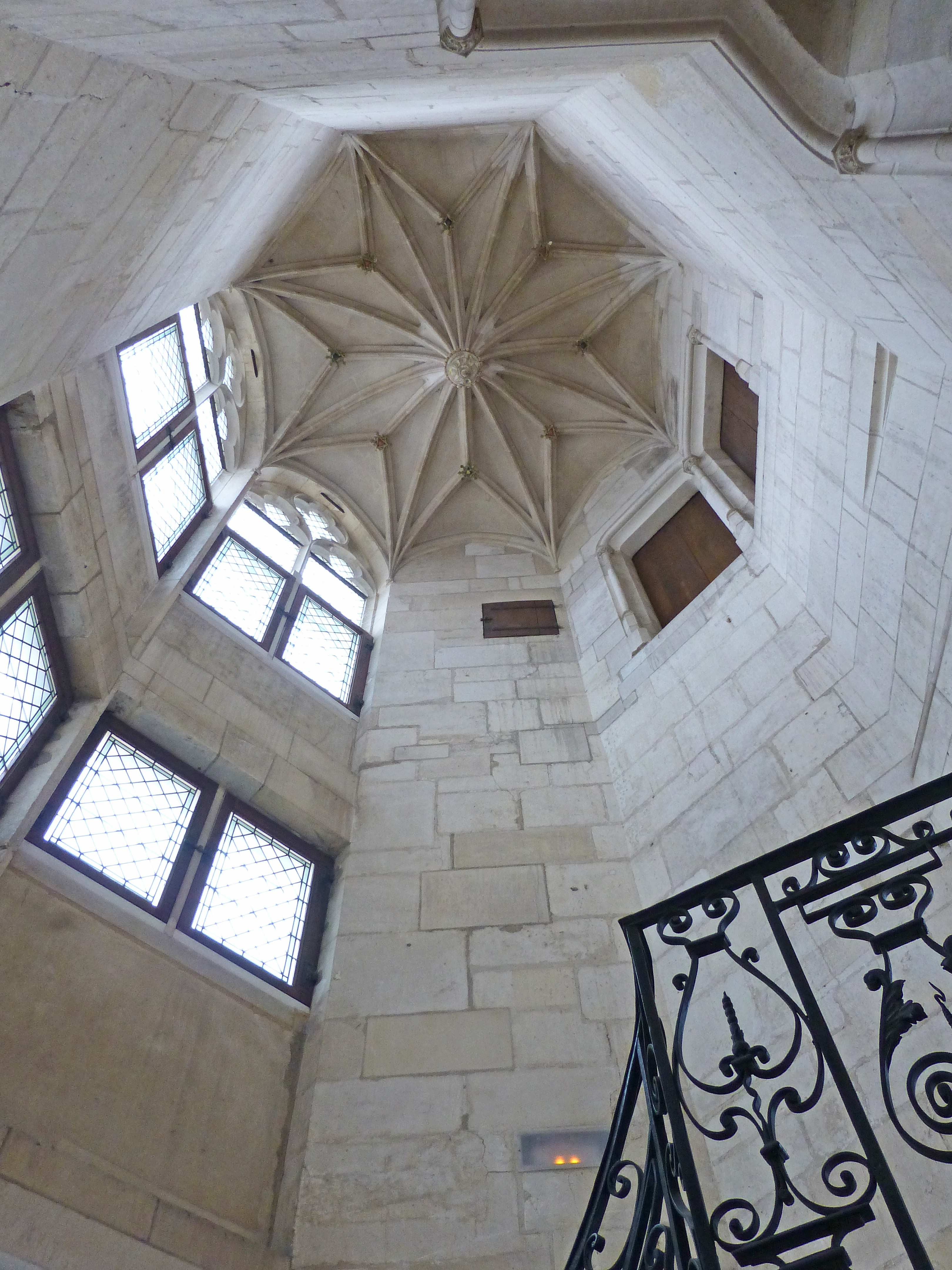 Voûte gothique d'un escalier dans le palais Jacques-Cœur de Bourges